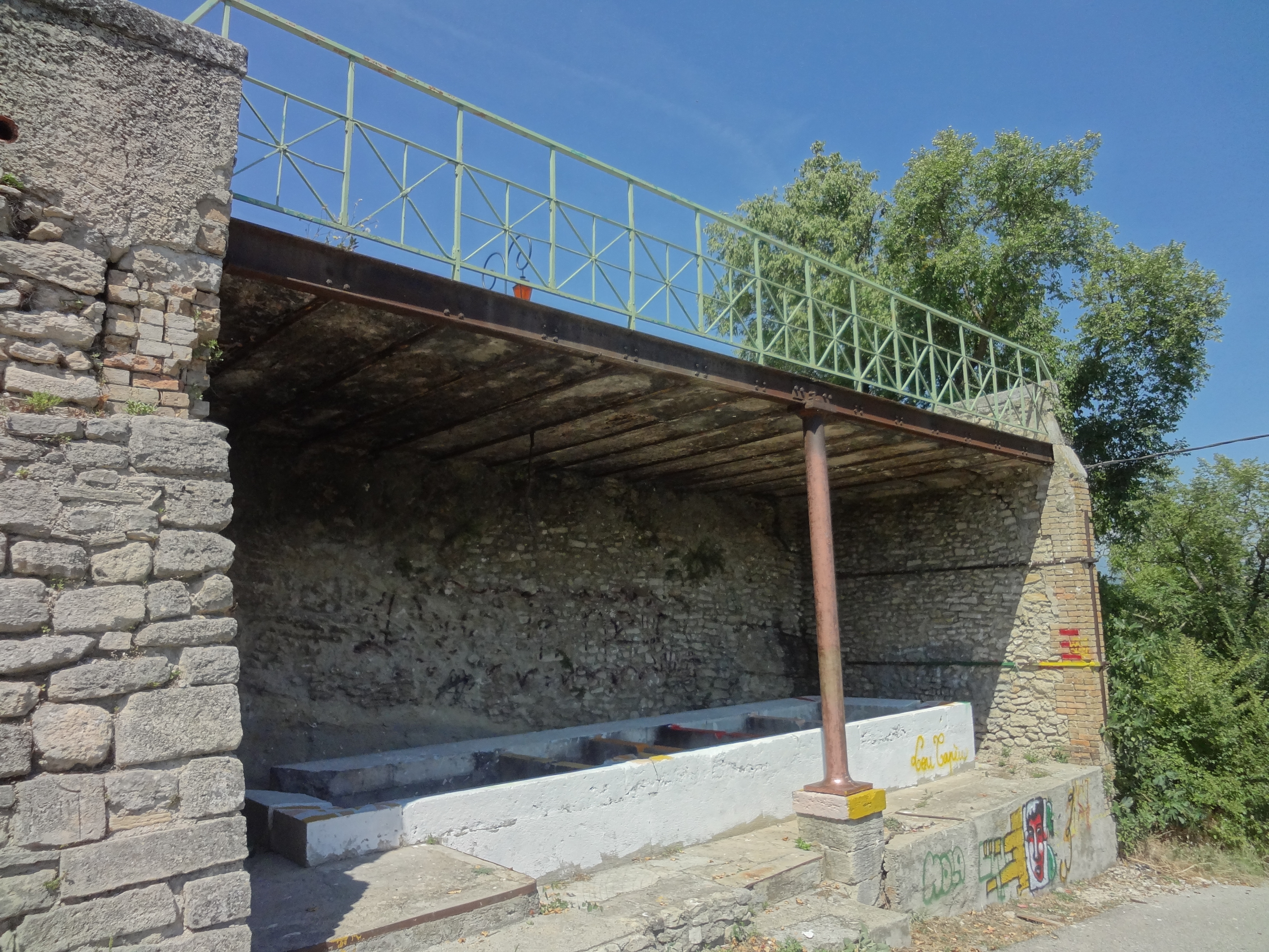 Belvédère et lavoir construits à la limite du village, fin XIXe, le belvédère pour le repos des hommes, le lavoir pour le travail des femmes...